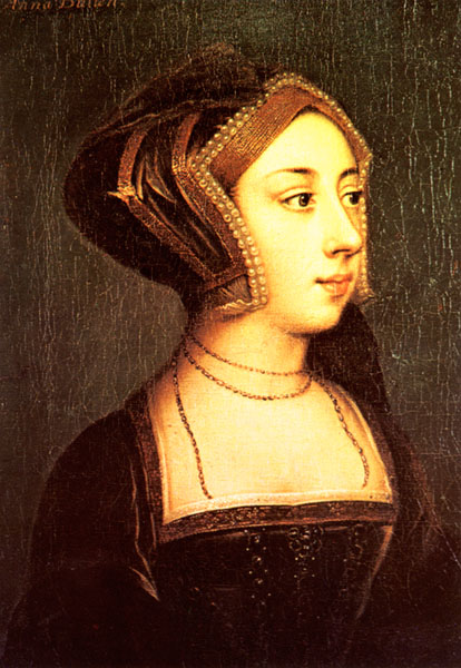 Anna Bullen